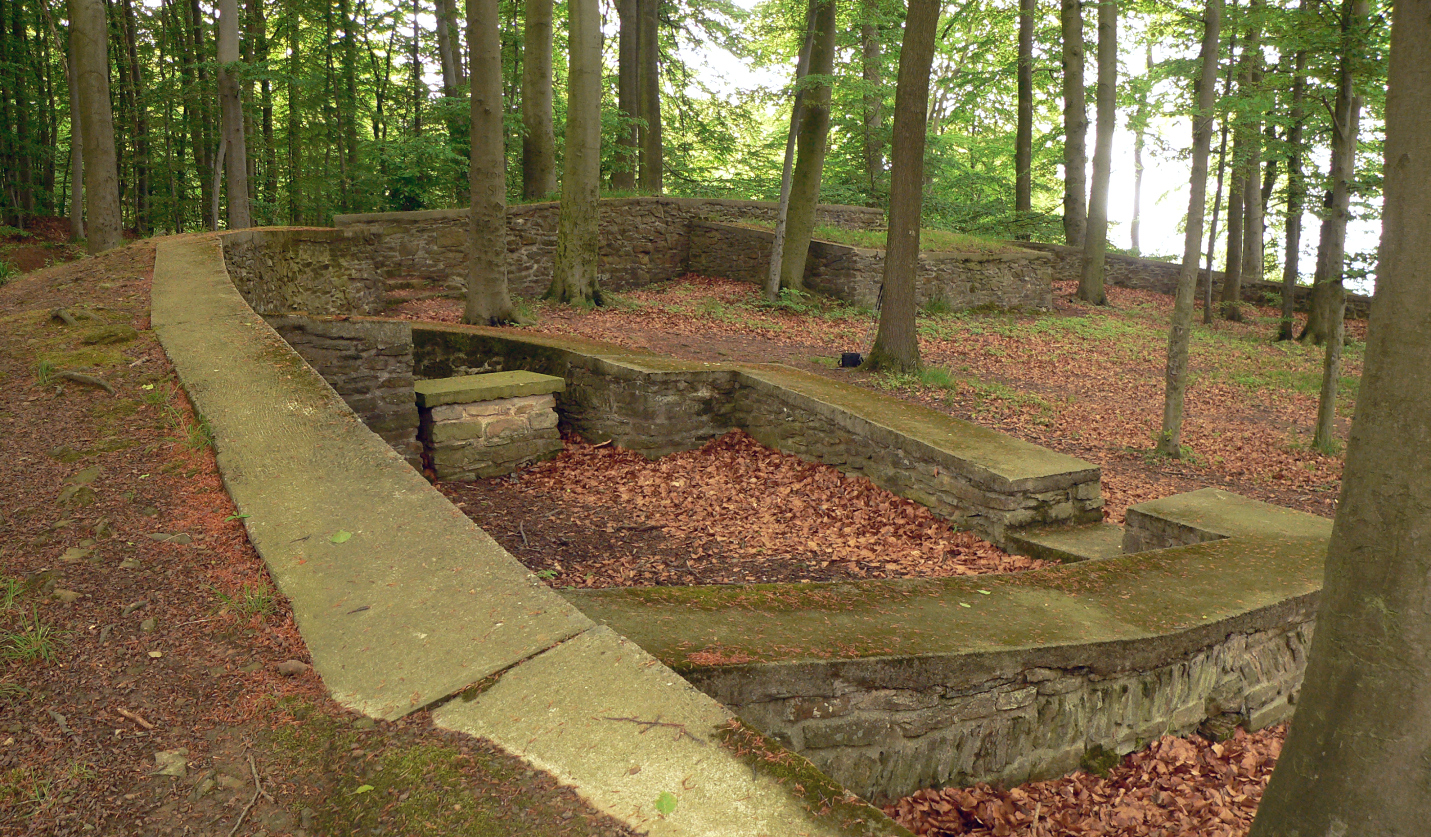 Hauptburg der Hünenburg (Rinteln) Hohenrode mit Kapelle im Vordergrund und angedeutetem Altar